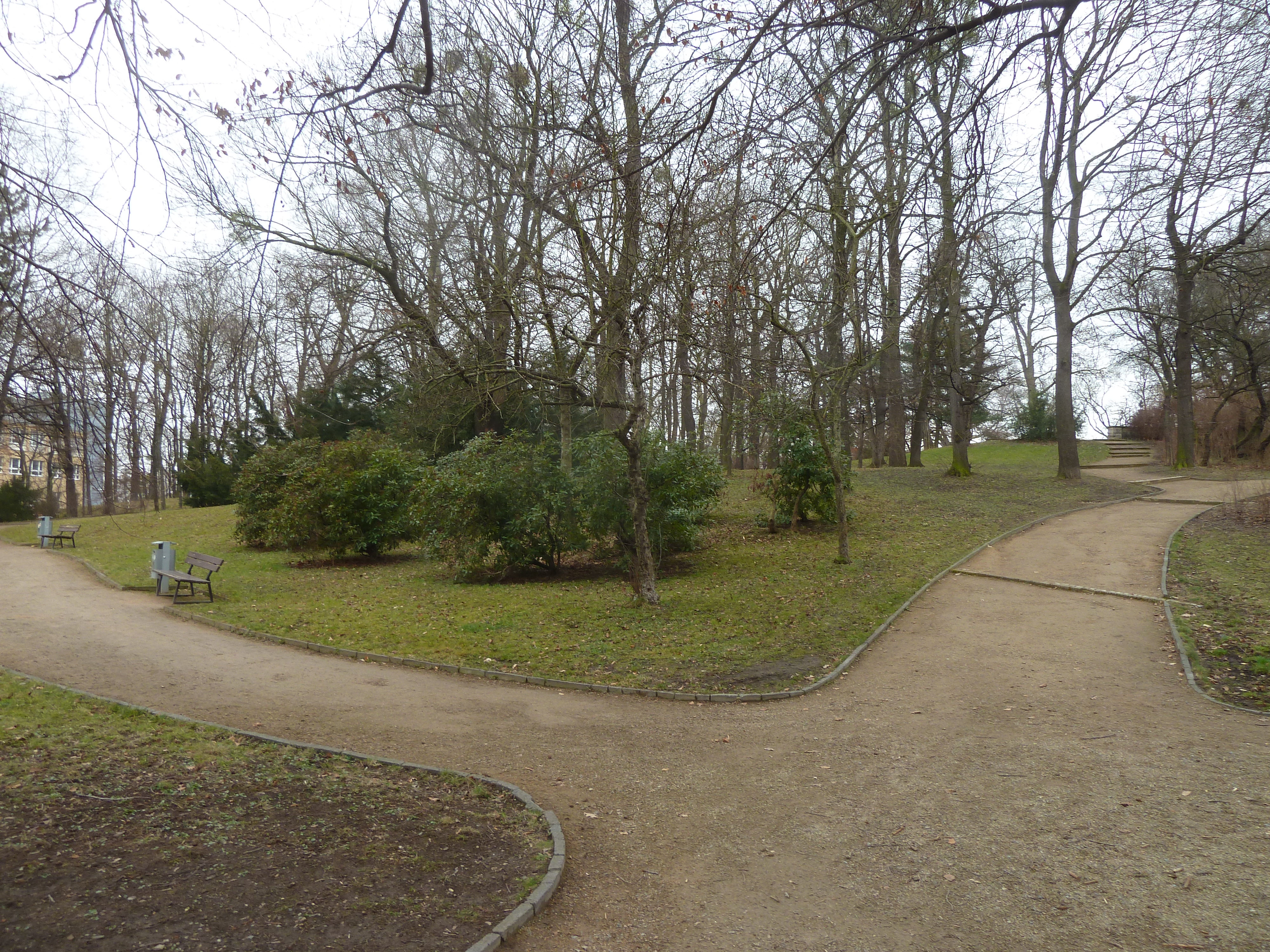 Winterimpression des Beutlerparks